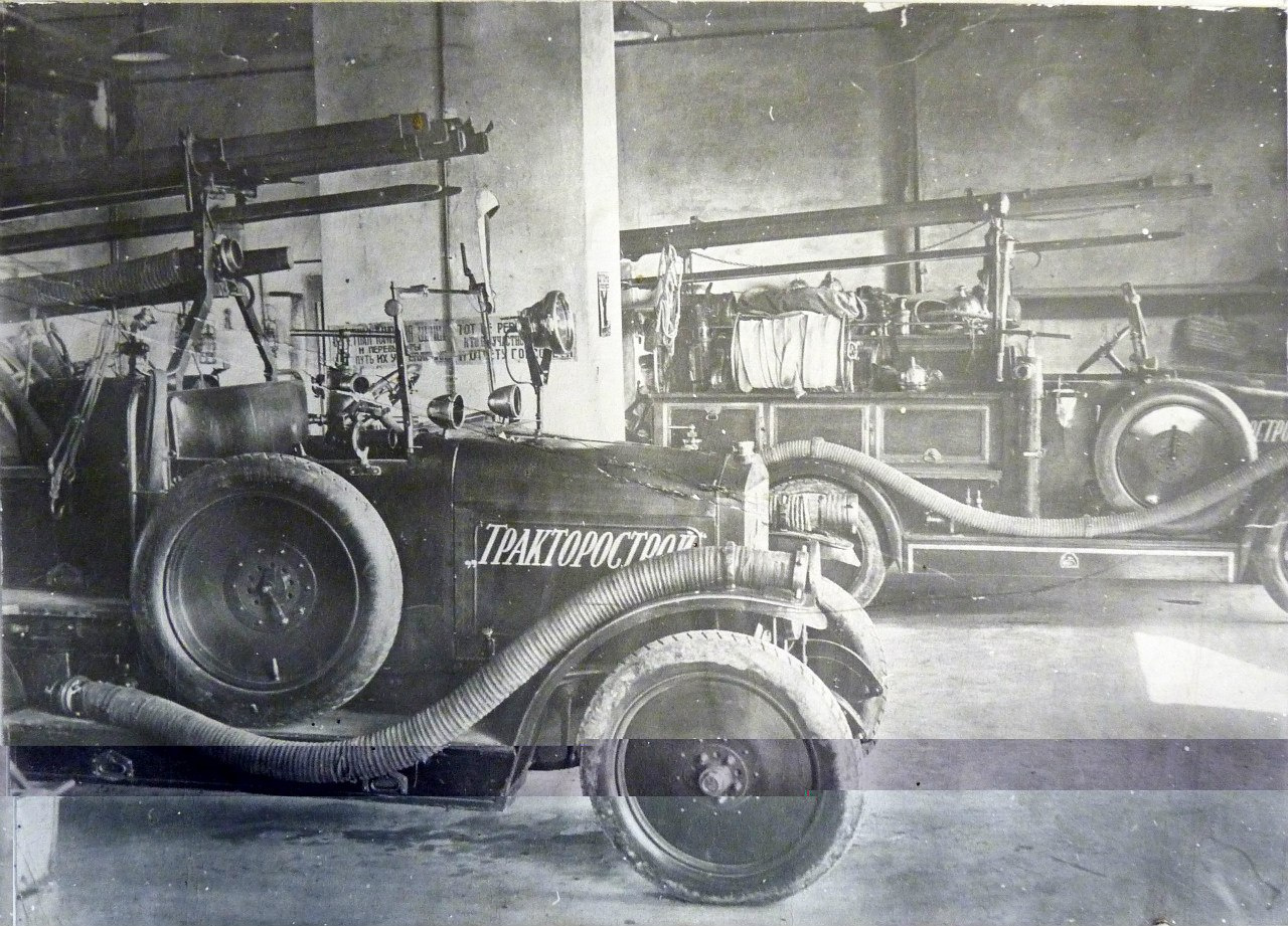 Пожарная часть сталинградского тракторного завода 1930 год